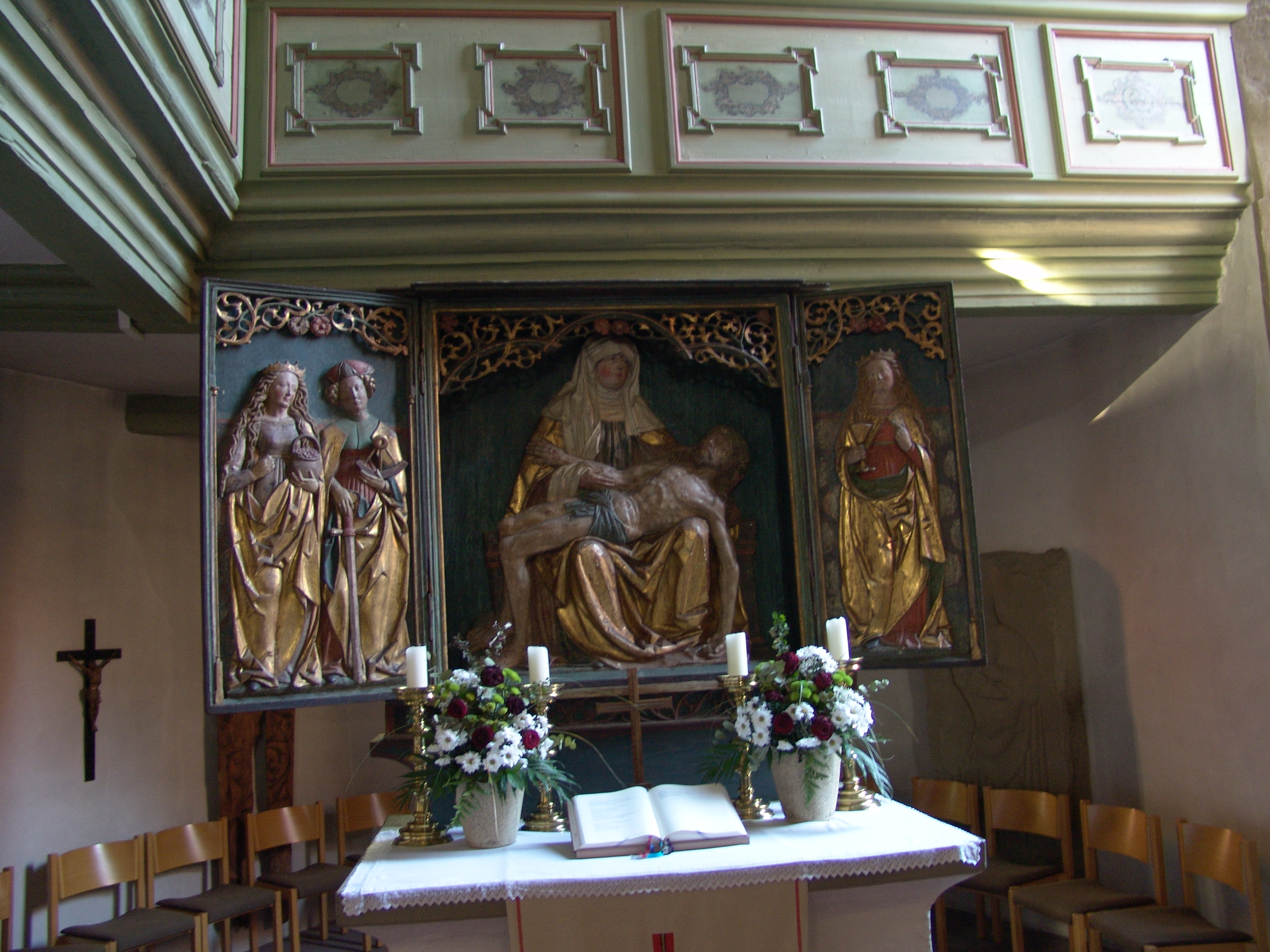 evang.-luth. Kirche Pfarrkirche in Abtswind